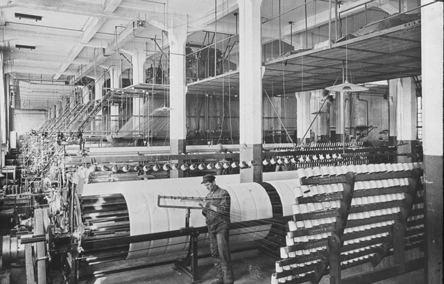 Dresden-Dobritz Dresdner Gardinen- und Spitzenmanufaktur – Schärmaschine